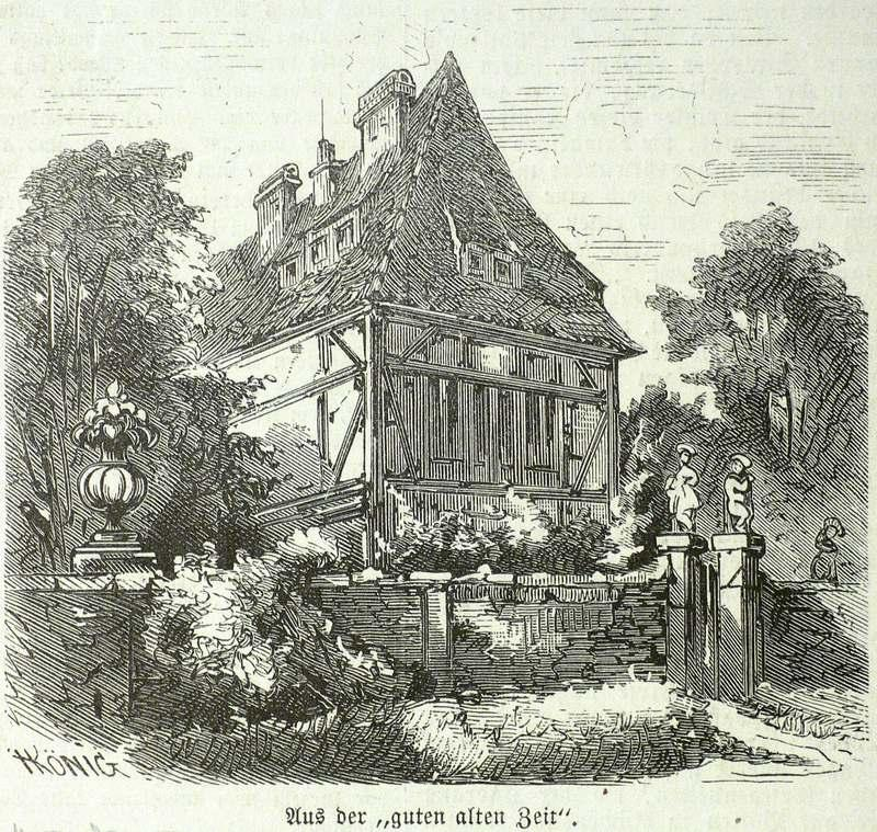 Aus der "guten alten Zeit", von Herbert König, Holzstich 1871